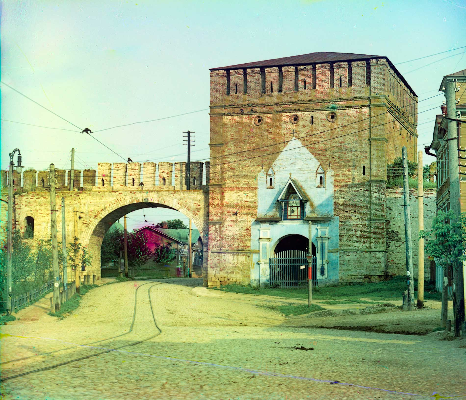 Walls of 16th-century kremlin in Smolensk Крепостная стена Смоленска (т.н. "Смоленский кремль"). Никольские ворота